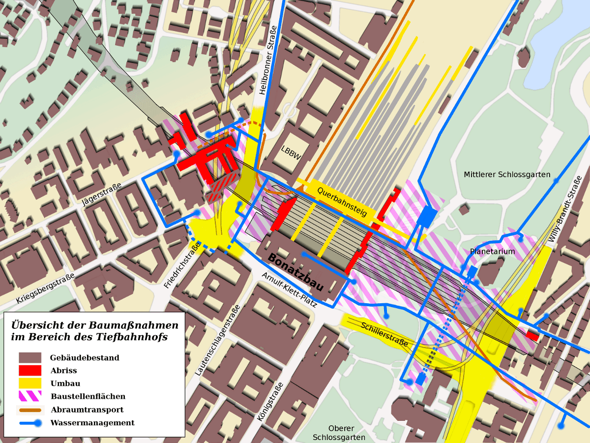 Projekt Stuttgart 21 - Grafik zur Illustration der zum Umbau und der Tieferlegung des Stuttgarter Hauptbahnhofs notwendigen Bautaetigkeiten in der Innenstadt